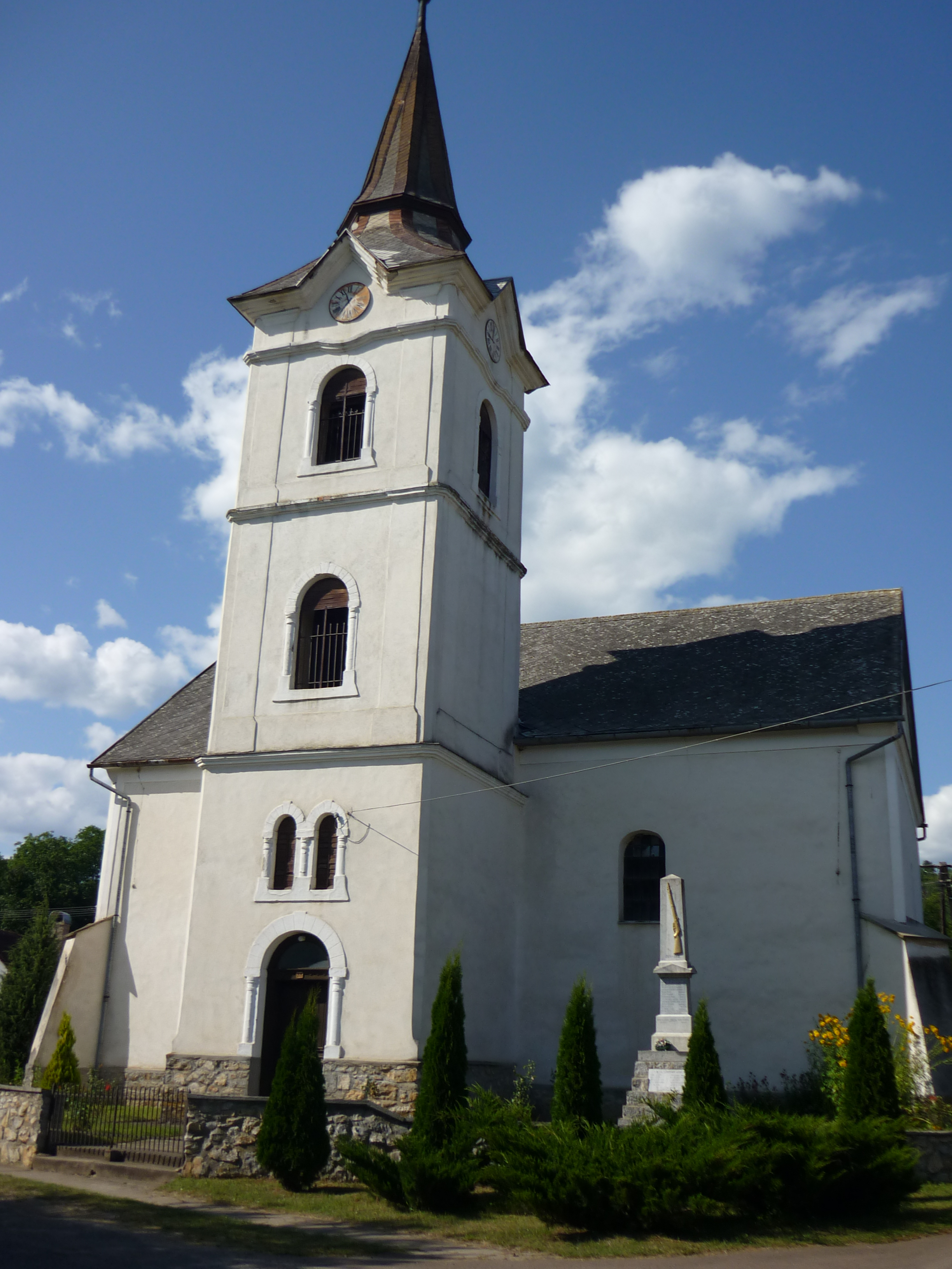 Égerszögi református templom (1791)